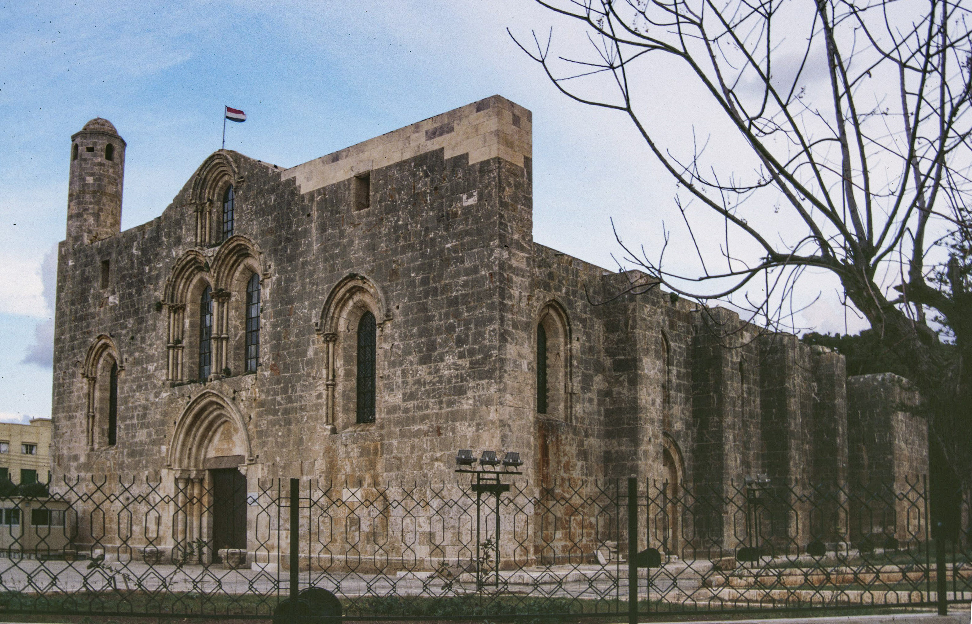 Nôtre Dame in Tartus